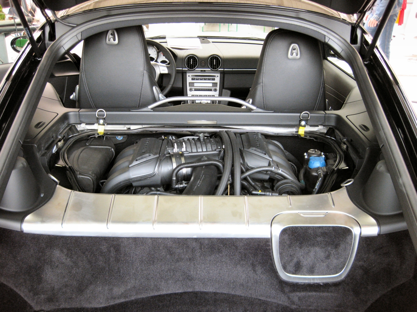 Motorraum Porsche Cayman (987c)